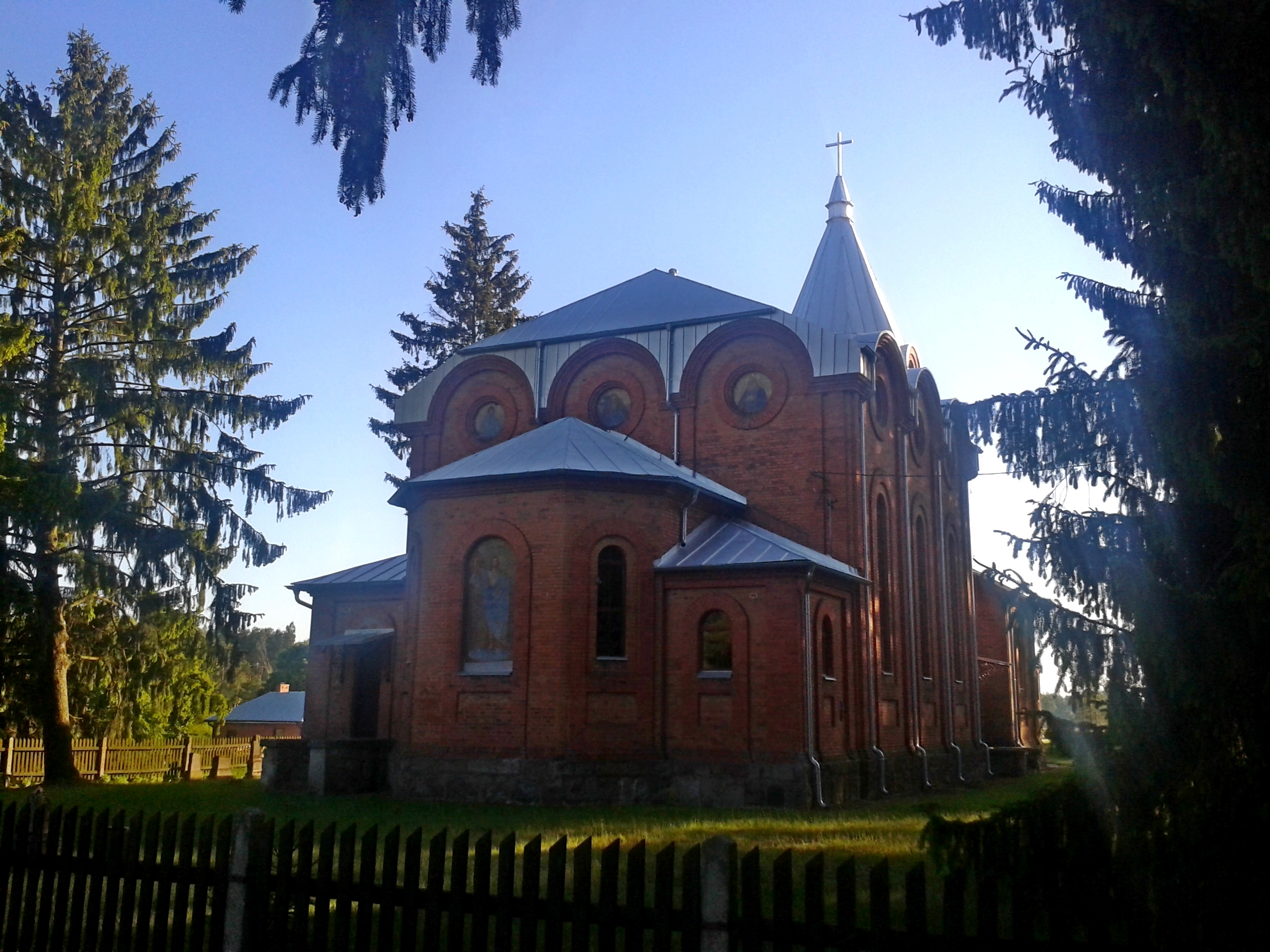 Cerkiew (ob. kościół) w Suchawie, widok od strony prezbiterium